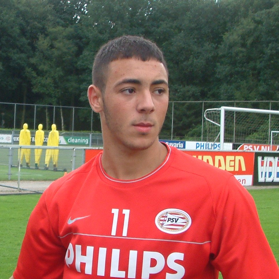 Nordin Amrabat. Speler van PSV; heeft altijd tijd voor de supporters.